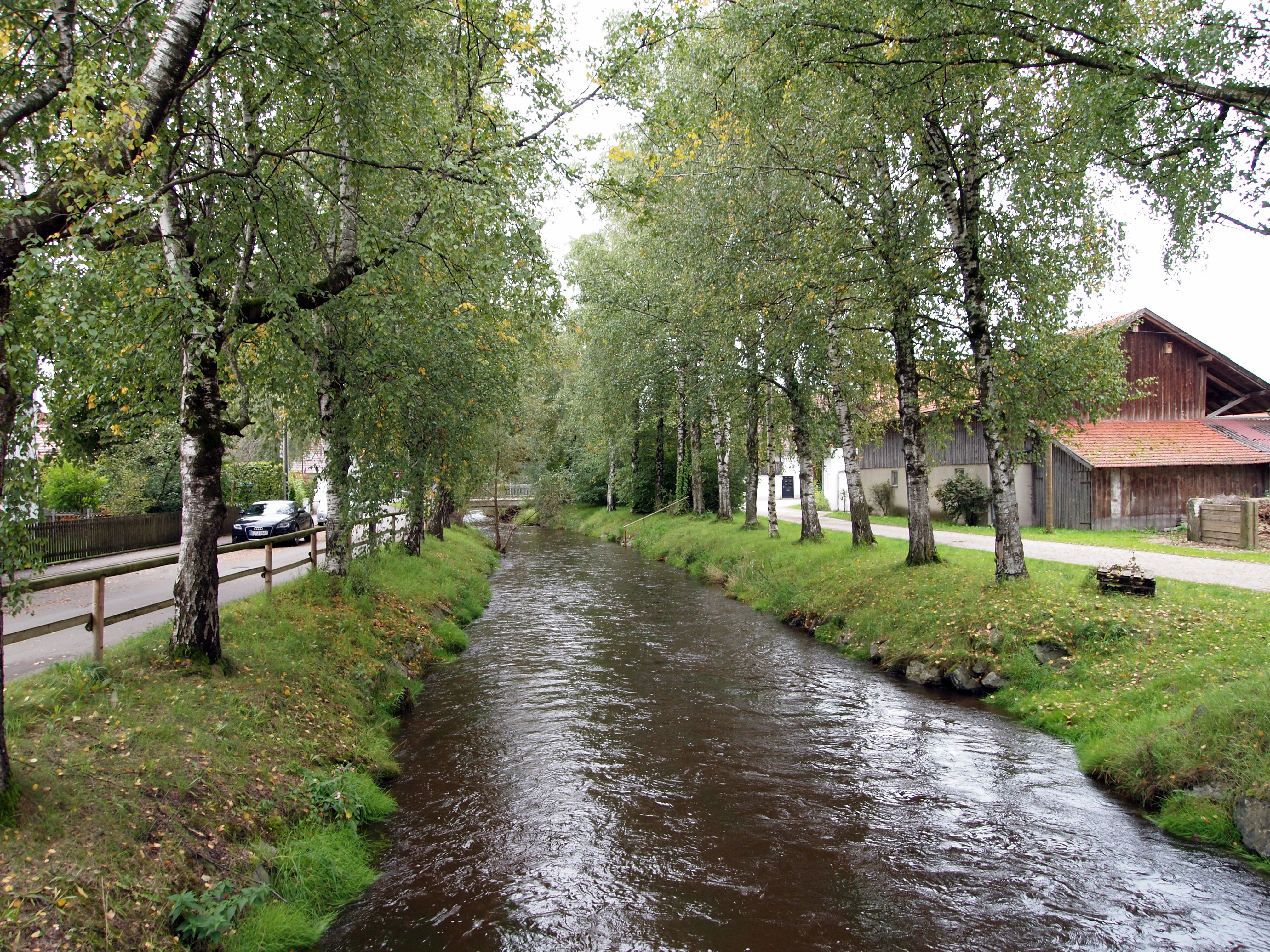 Die Gennach in Jengen